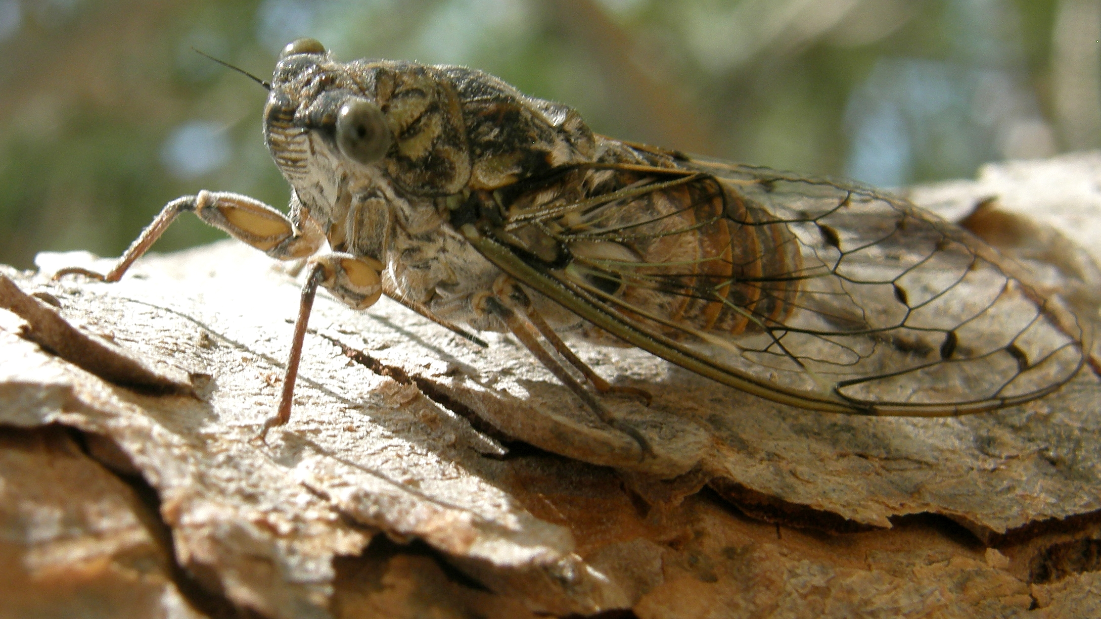 sur le tronc d'un pin. Voir en grand sur fond noir / View large on black Nîmes, Gard, France.